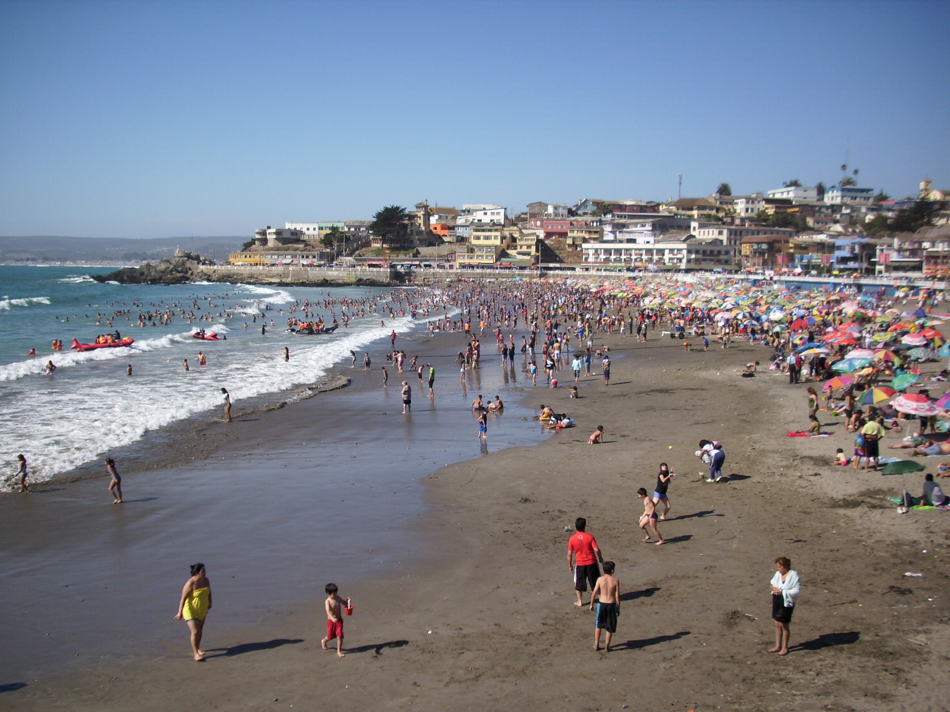 La popular Playa Chica de Cartagena. Provincia de San Antonio, V Región de Valparaíso, Chile. 19 de enero de 2010.